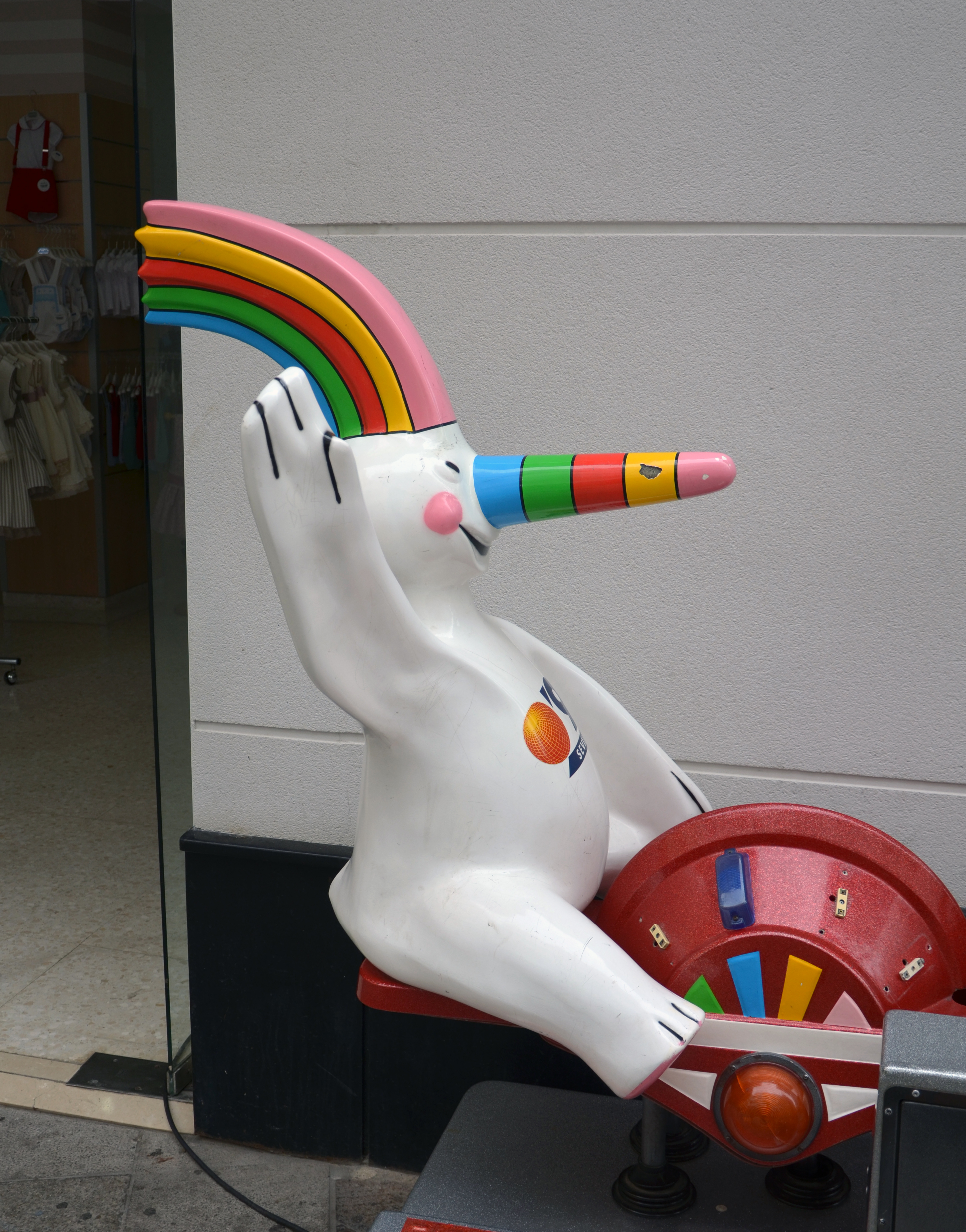 "Kiddie ride" représentant Curro, la mascotte de l'exposition universelle de 1992, photographié dans la rue Francos de Séville (Espagne).